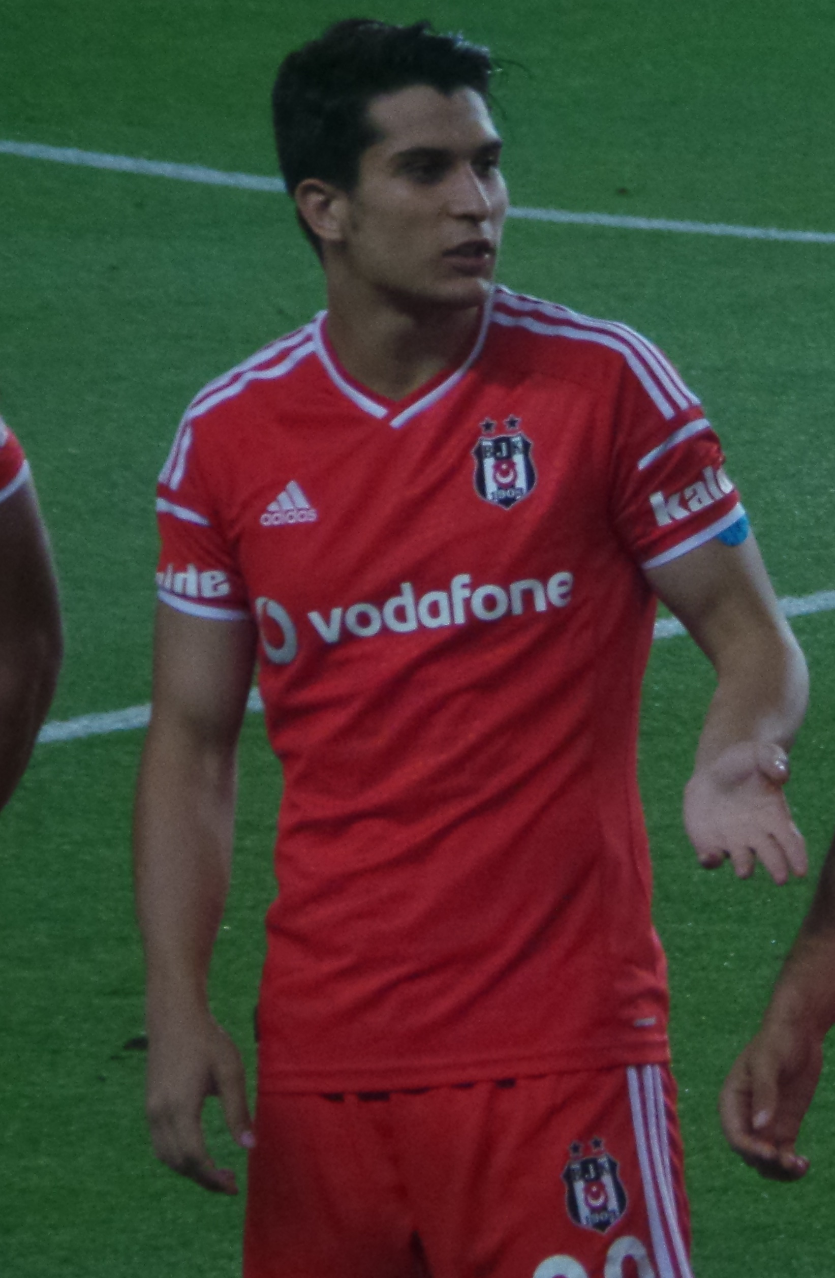 Necip Uysal'14